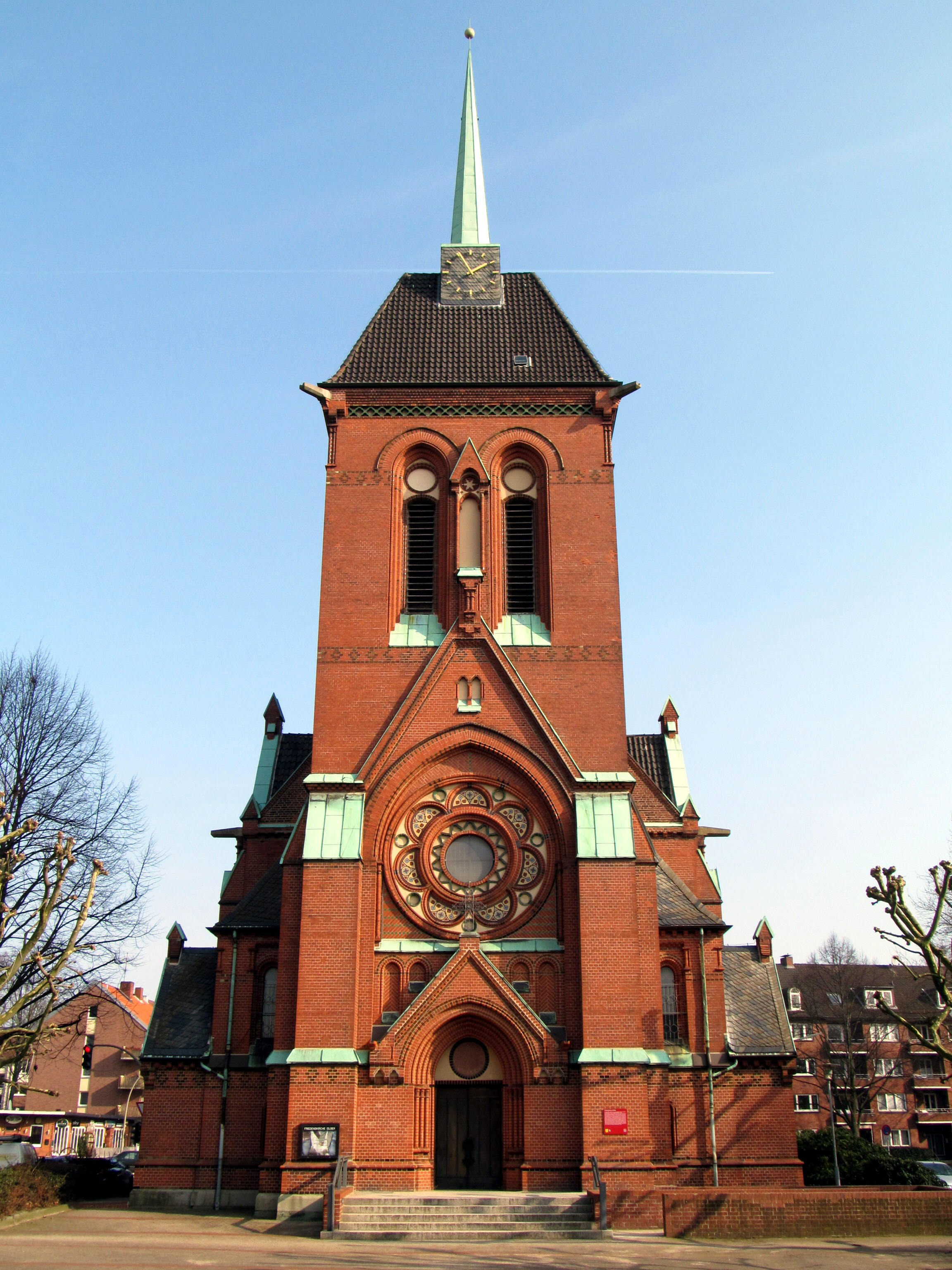 ev. Friedenskirche in Hamburg-Eilbek, erbaut 1883-85, Ansicht von Westen This is a photograph of an architectural monument.